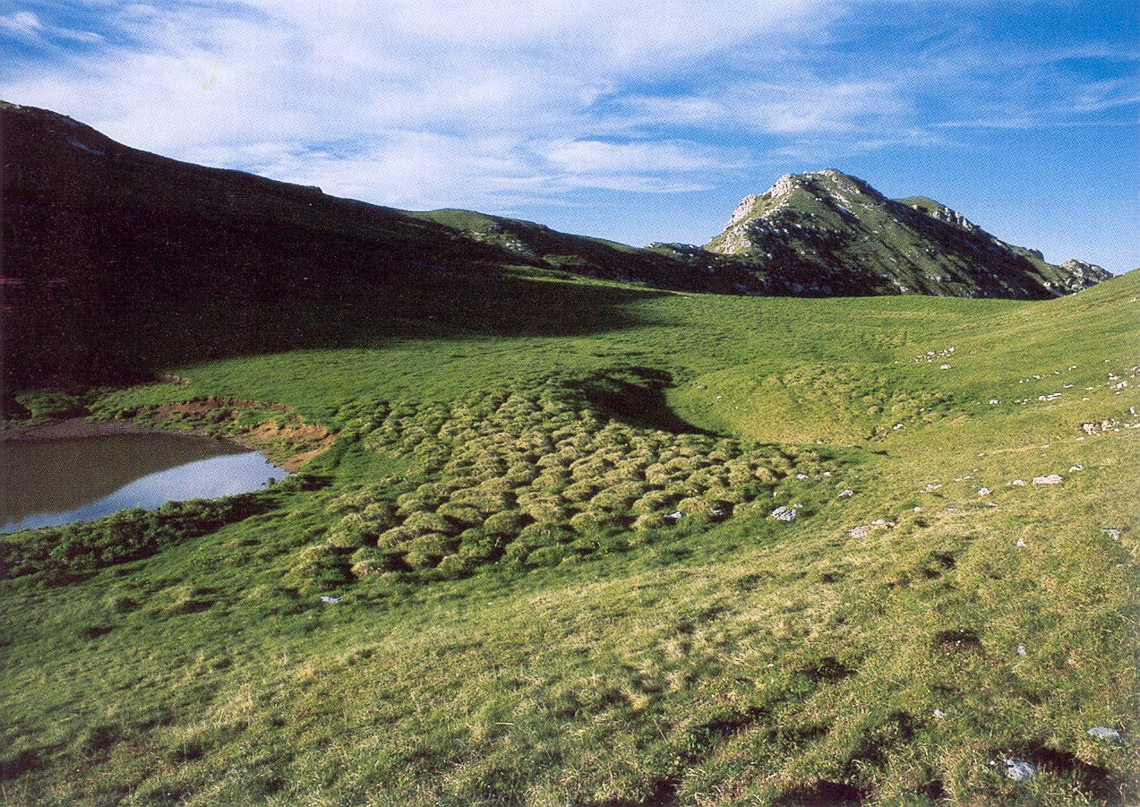 Cima Tombea sullo sfondo e in primo piano il pascolo con i caratteristici tumuli di erba e depressioni carsiche